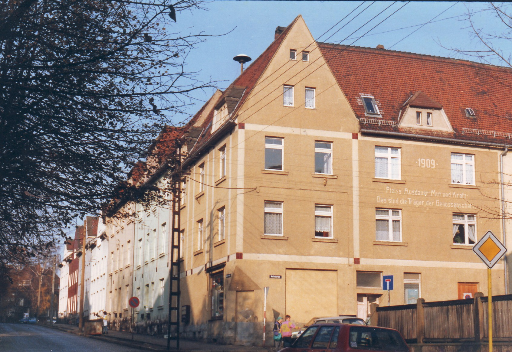 Häuserzeile der Apoldaer Arbeiterwohnungsbaugenossenschaft 1909